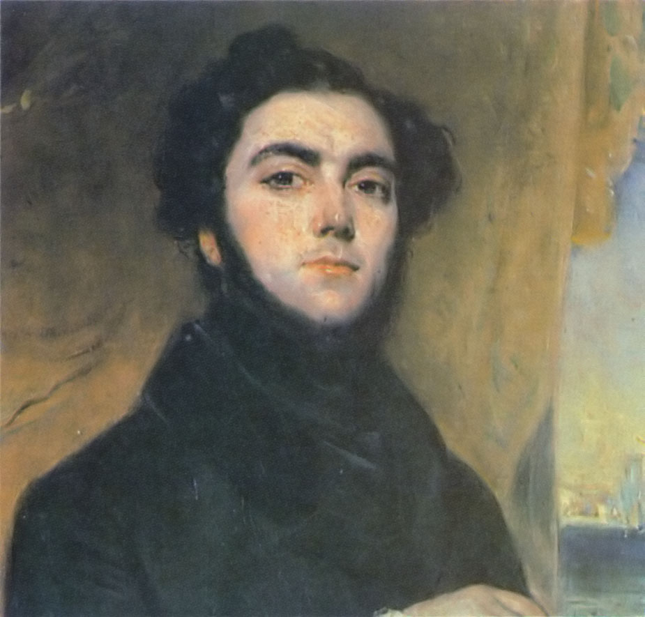 detail